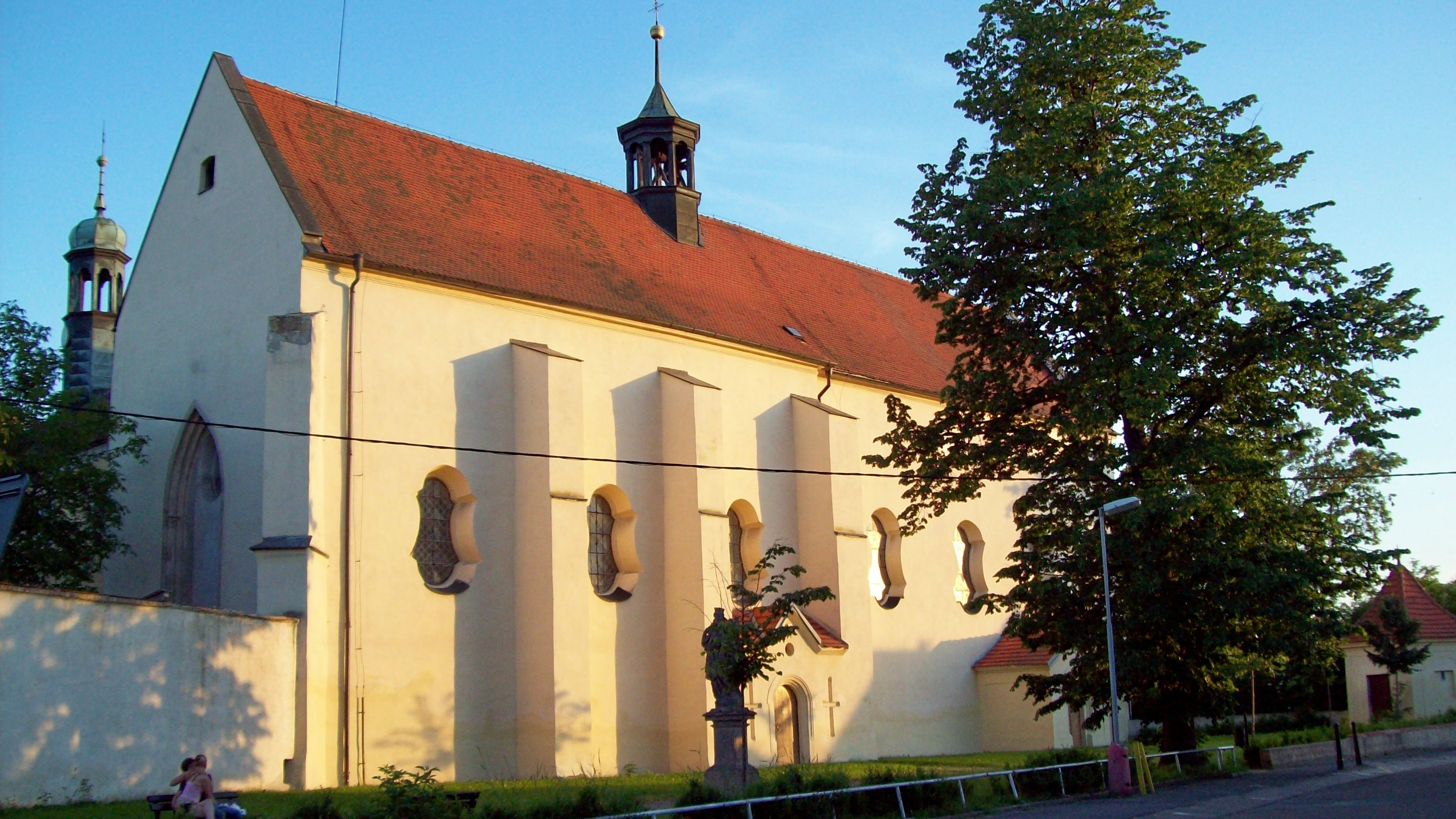 Kostel sv. Vavřince, ul. Českolipská 1111, Mělník-Pšovka.